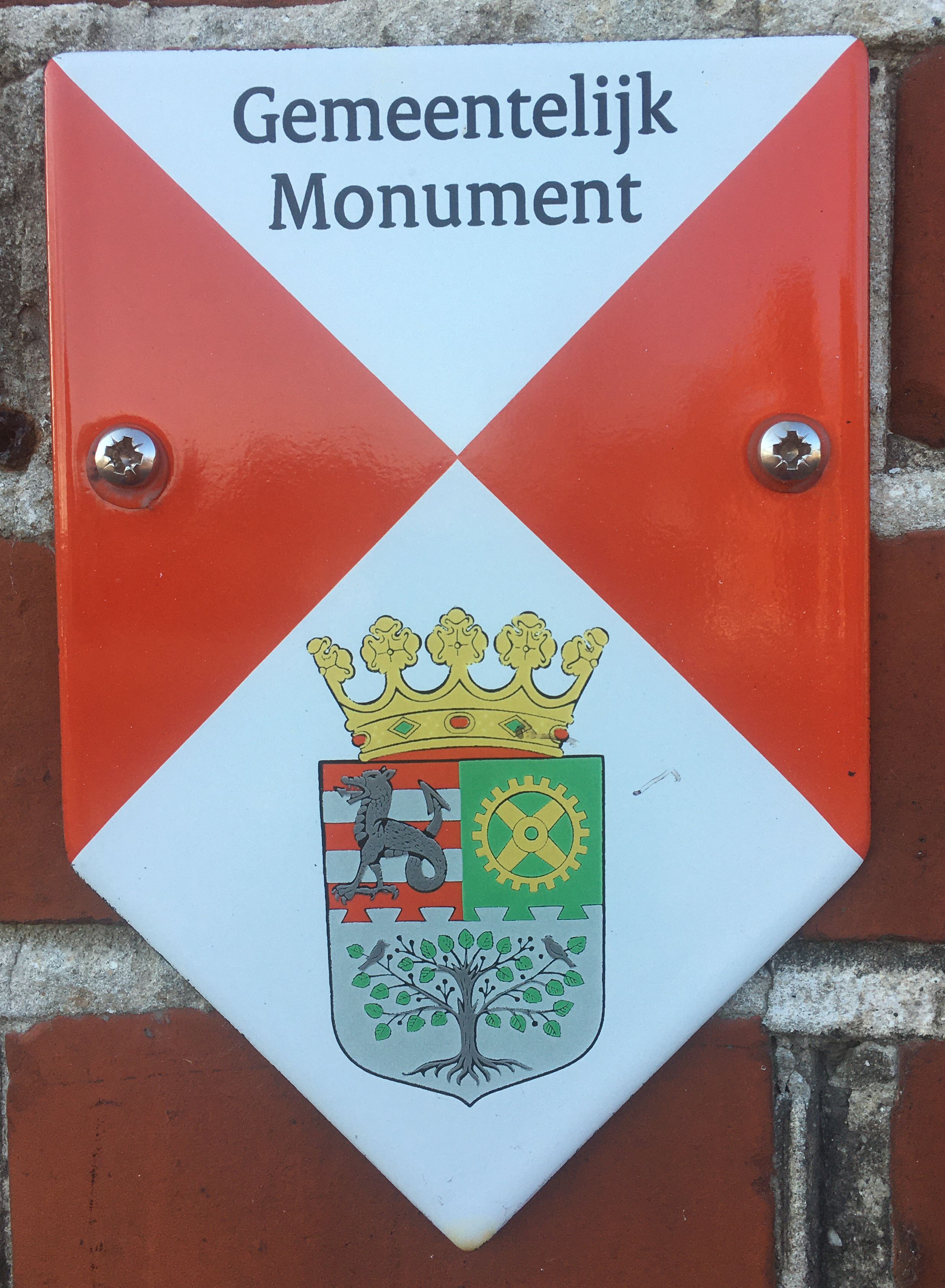 Schild van gemeentelijk monument op het voormalige postkantoor in Sappemeer